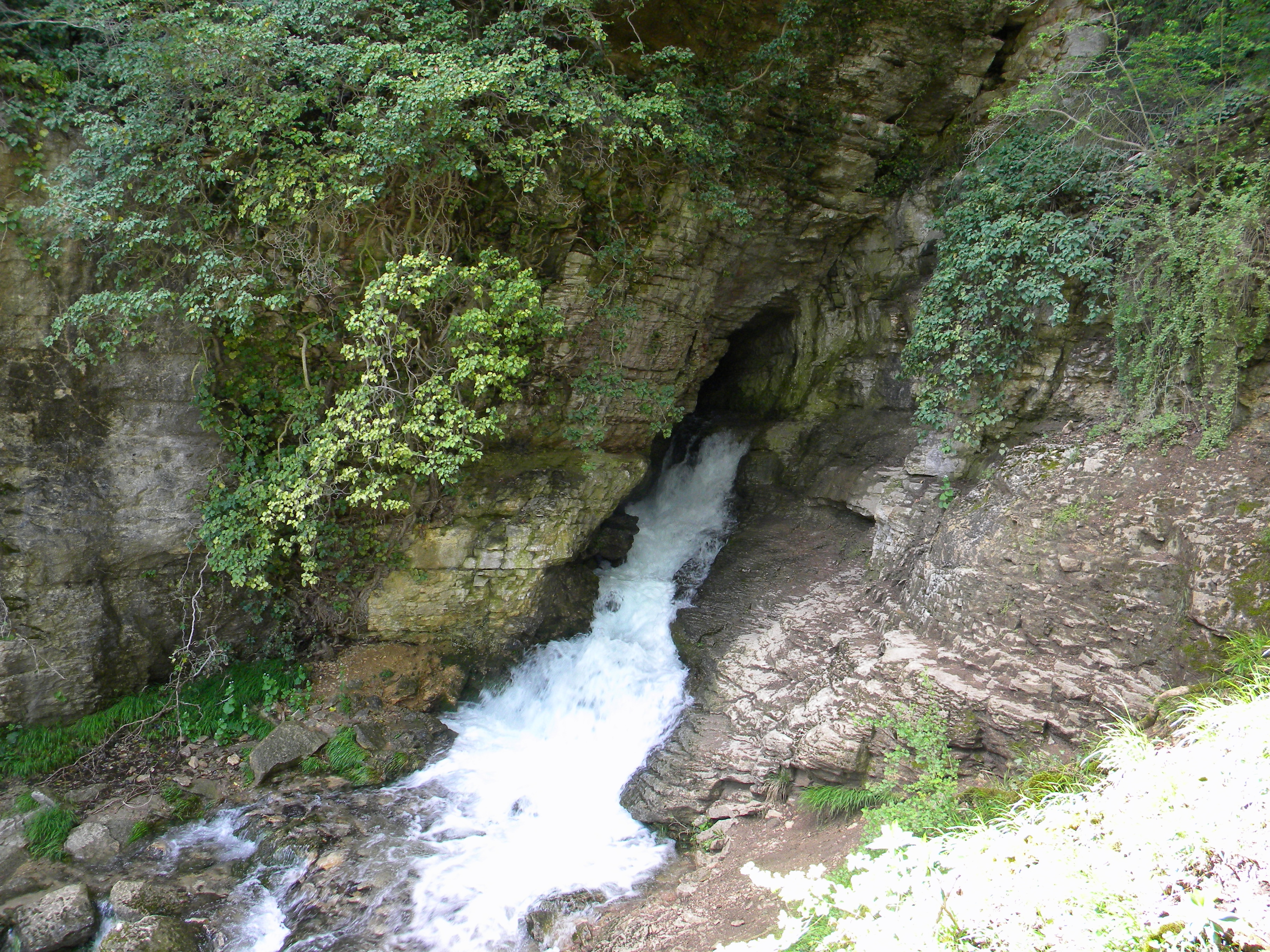 Fonto de la Kozano